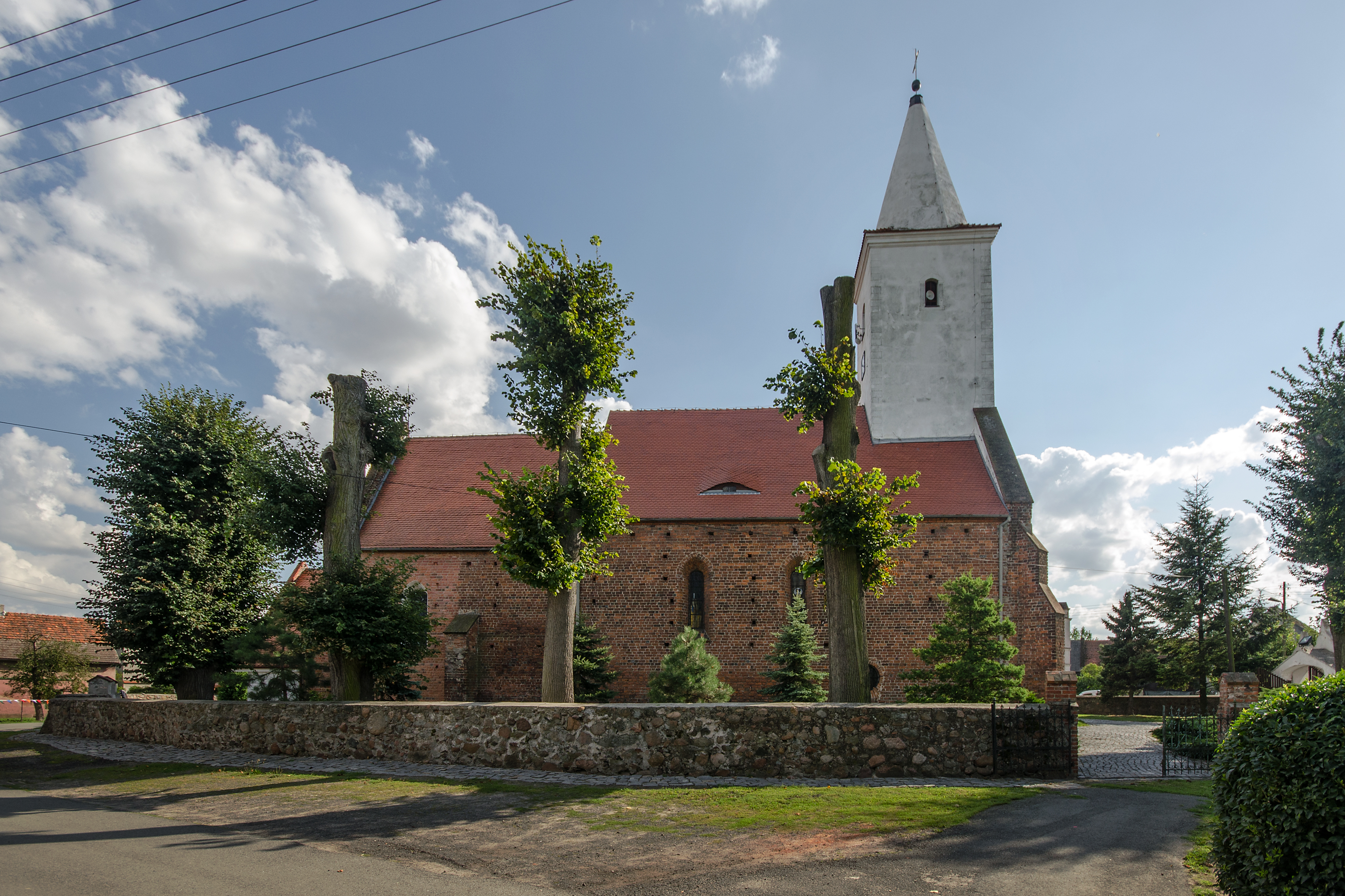 Pogorzela, kościół par. p.w. Najśw. Serca Jezusa, 1 poł. XIV, XVII, XVIII